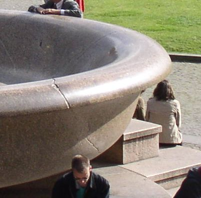 Bildausschnitt: Riss in der Granitschale im Lustgarten Ausschnitt aus dem Bild :Image:Lustgarten 2.JPG auf Commons (Original text: Auf Commons:) Lustgarten - Blick von den Stufen des Alten Museums über die Granitschale im Vordergrund zum Palast der Republik und dem Staatsratsgebäude der DDR rechts. photo taken by Achim Raschka Source: : 21:42, 3. Okt 2004 . . Necrophorus (Diskussion) . . 2288 x 1712 (707164 Byte) (Lustgarten (Berlin), fotografiert von Benutzer:Necrophorus, GNU FDL)